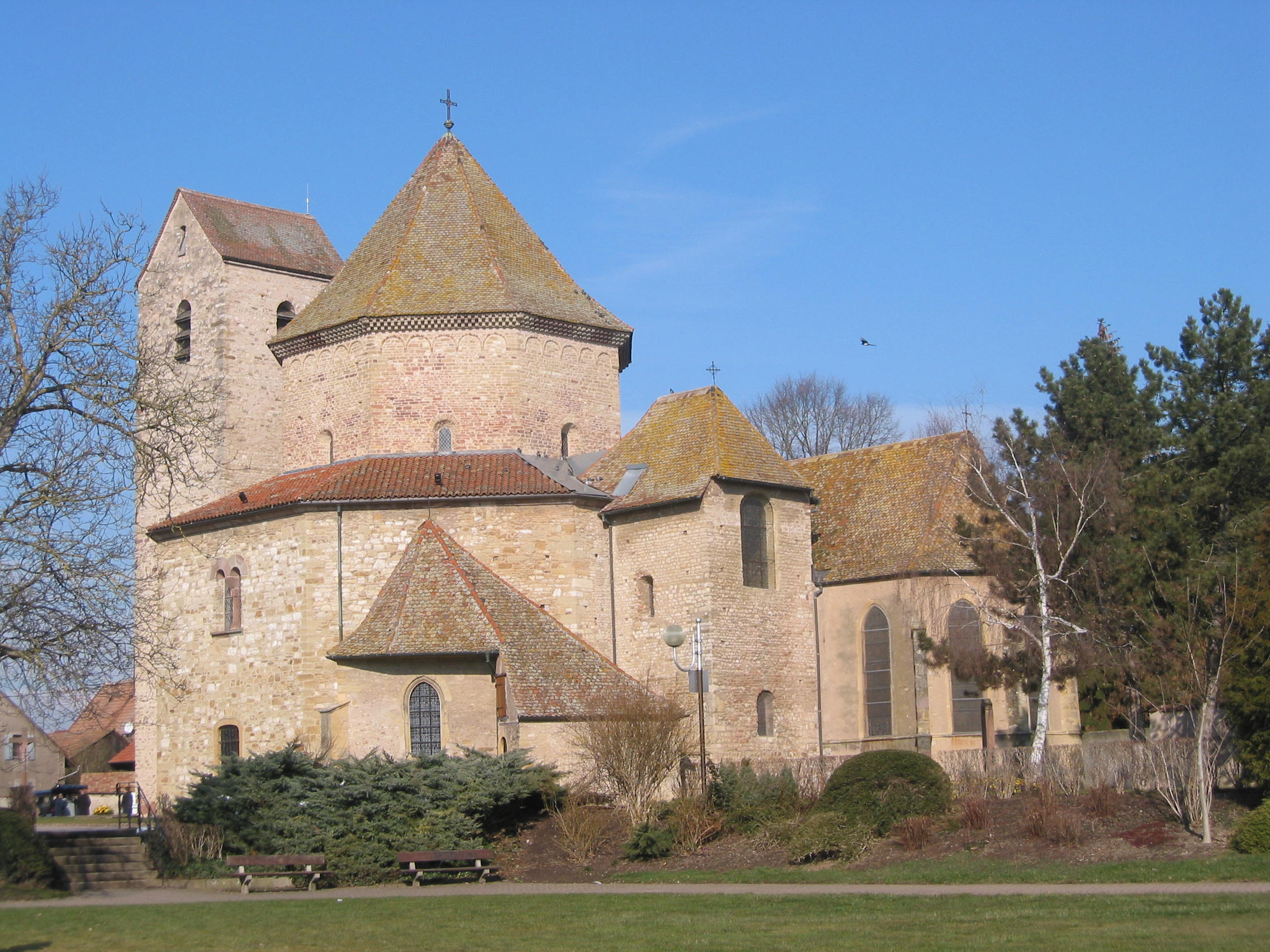 Die Abteikirche von Ottmarsheim aus Richtung SO